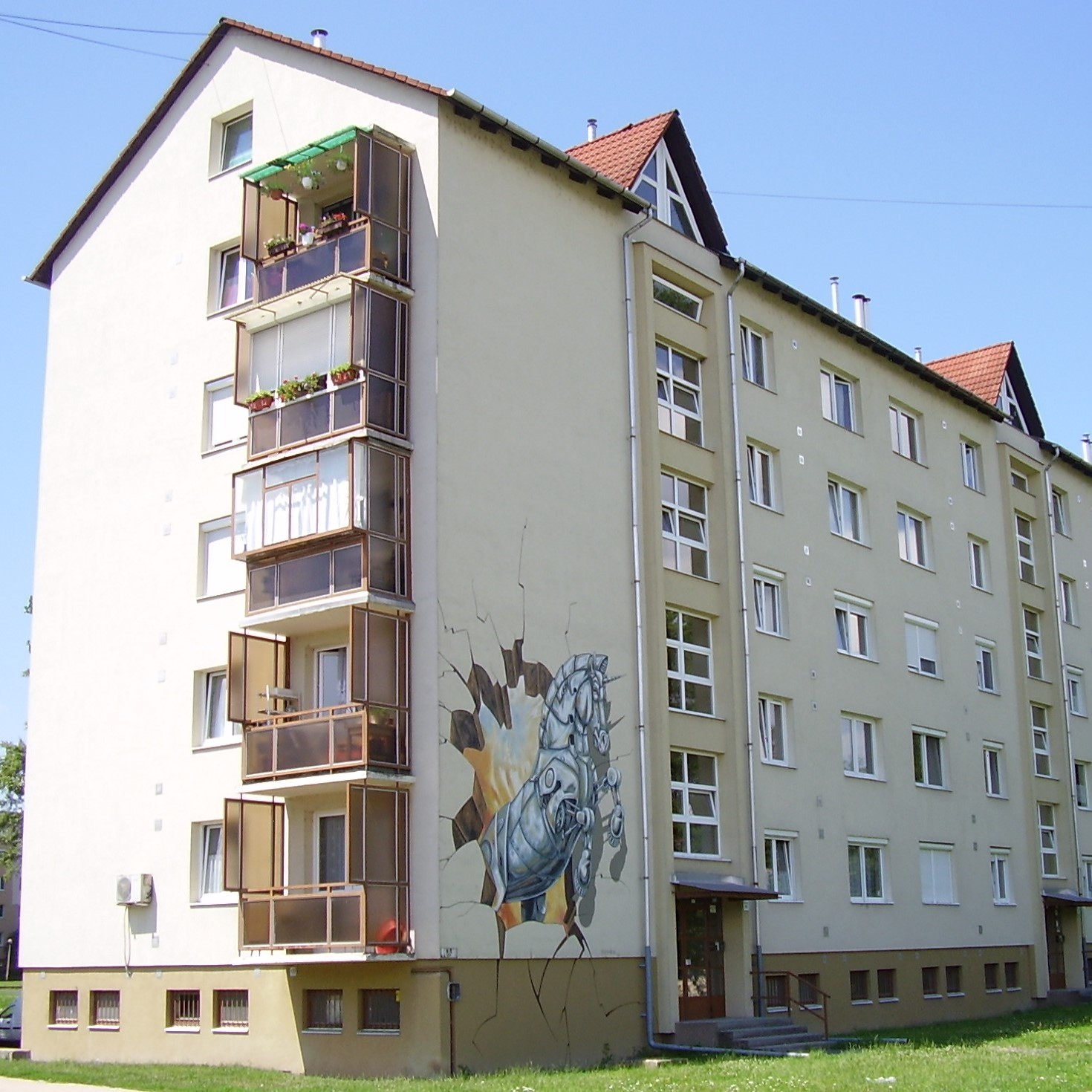 Kazincbarcika, Fő tér 19. épület oldalán Remko Van Schaik: Robot unikornis falfestménye, a művész első magyarországi műve.